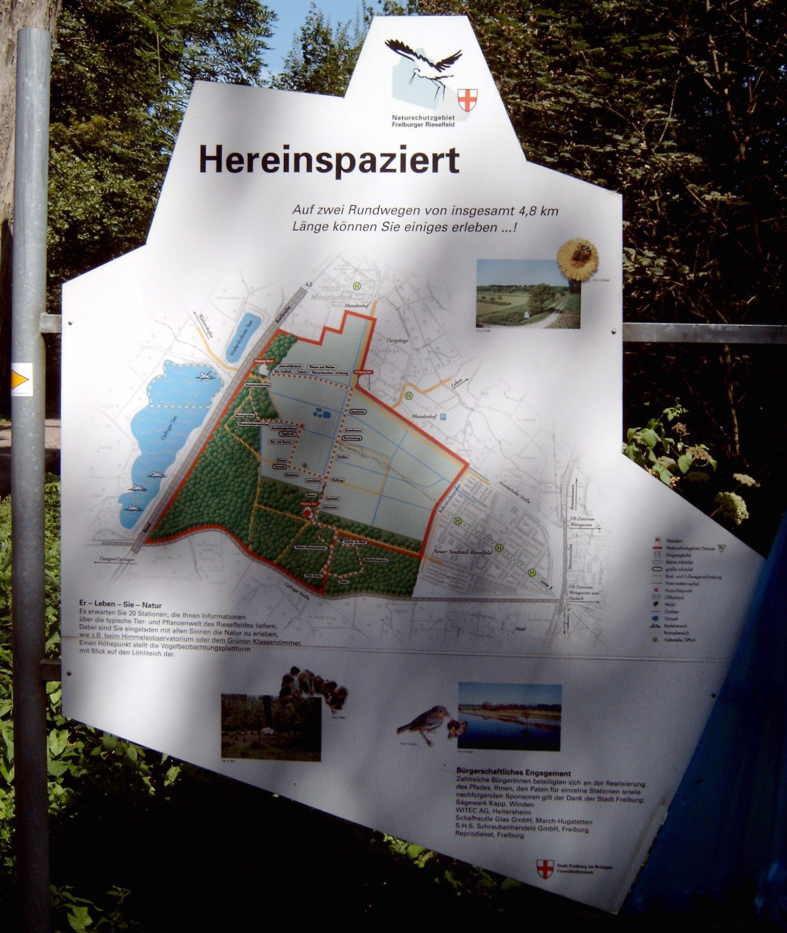 Informationstafel zum Naturschutzgebiet Freiburger Rieselfeld